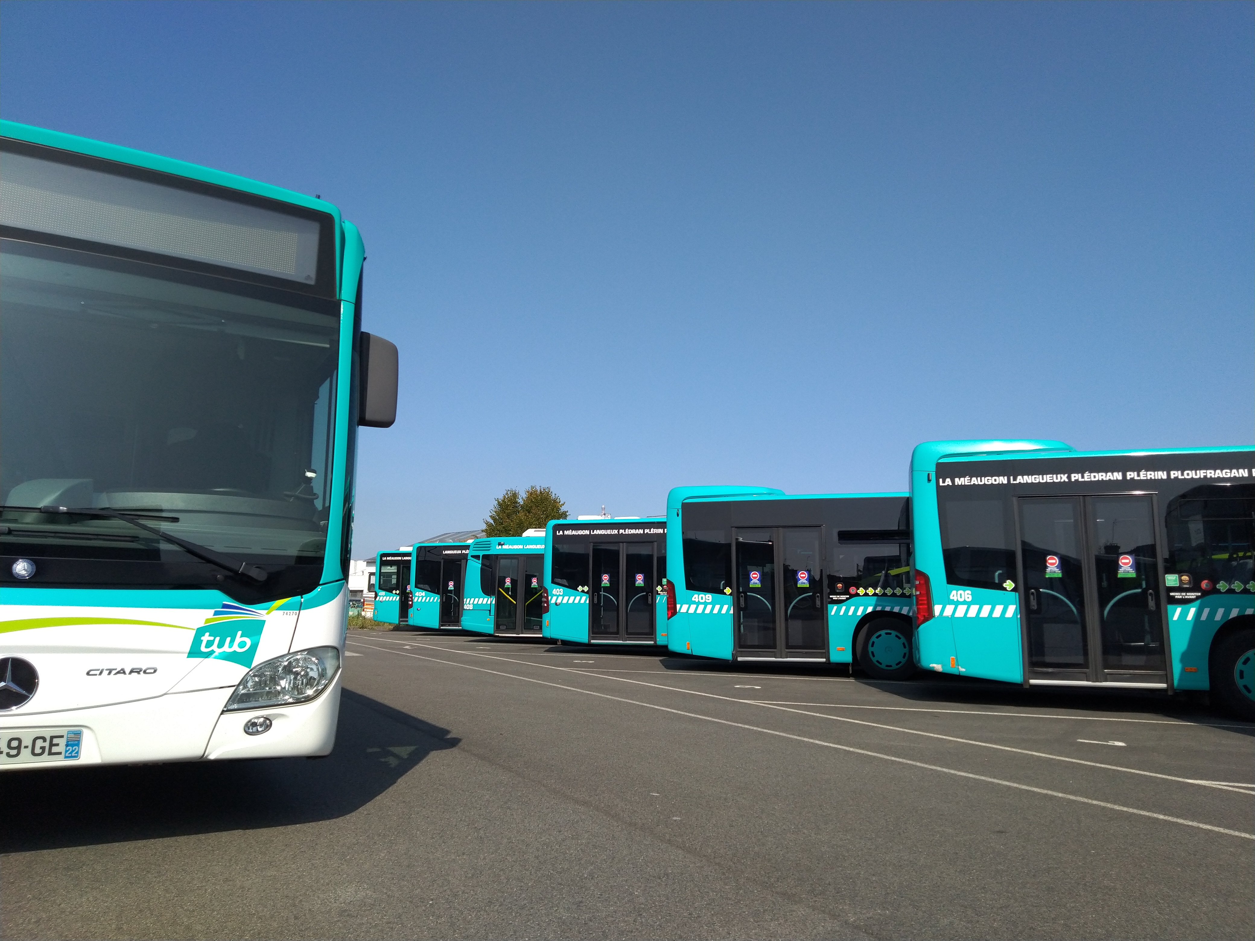 Dépôt CAT véhicules TUB